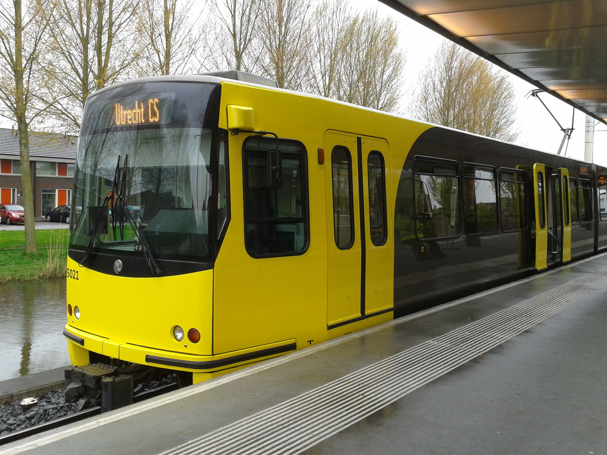 Hier staat tramstel 5021 bij halte IJsselstein Zuid.